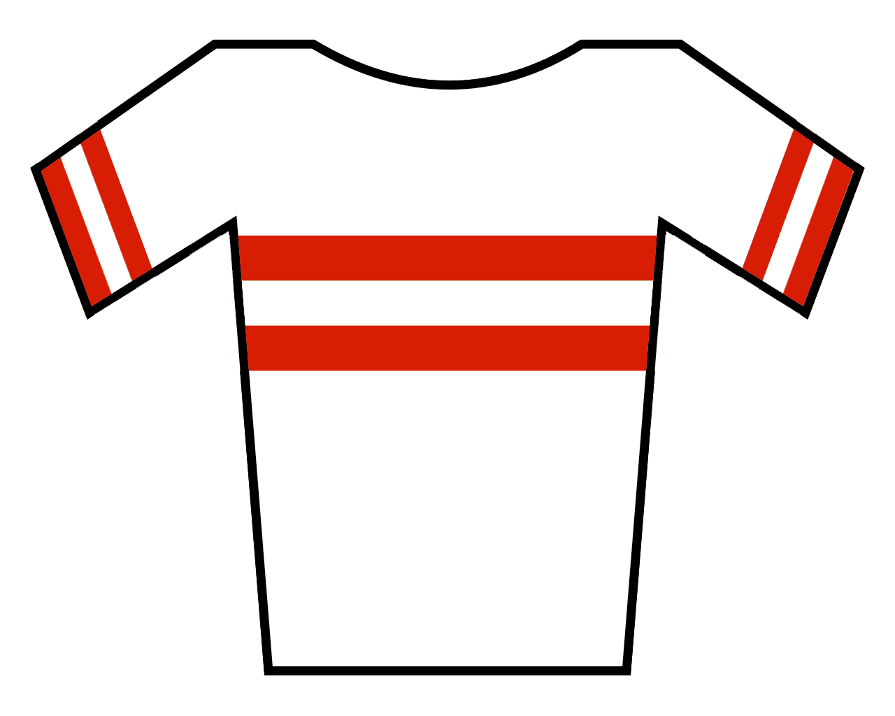 Maillot de Austria